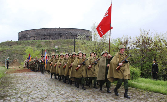 В Армении в День Победы военнослужащие ЮВО приняли участие в торжественных мероприятиях